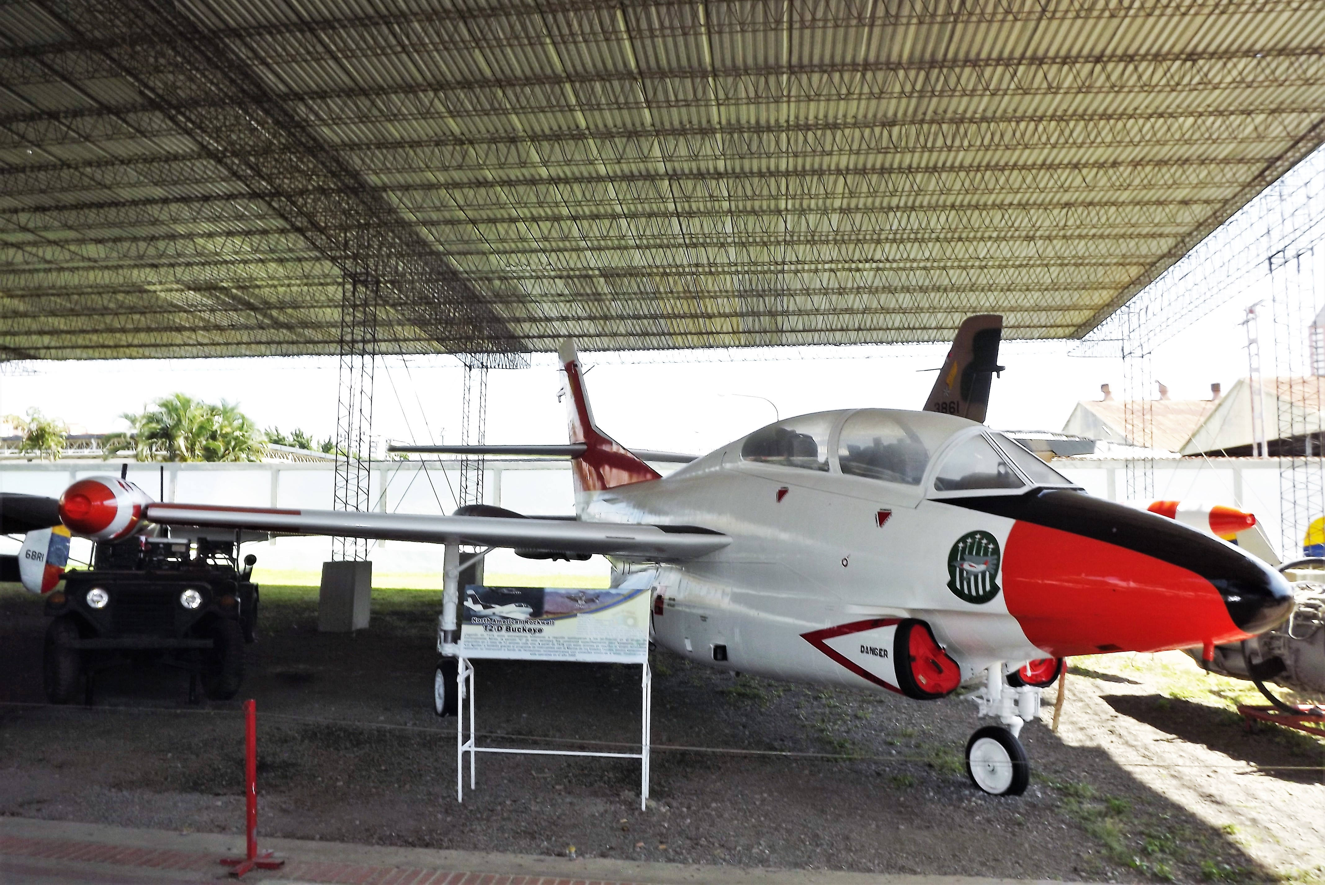 North American T-2D Buckeye (5612)